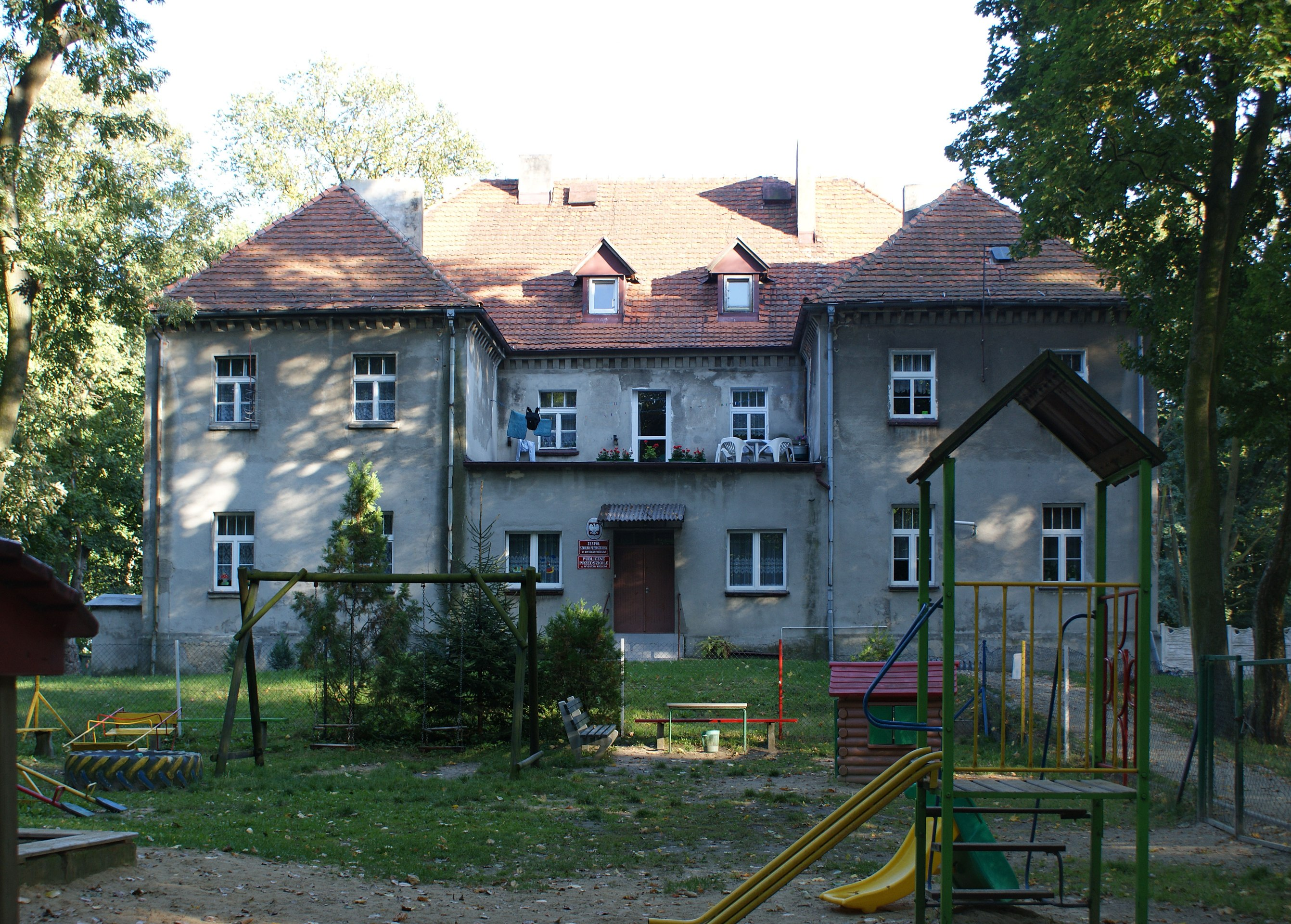 Wysocko Wielkie - dwór z połowy XIX w. (zabytek nr 723/A)